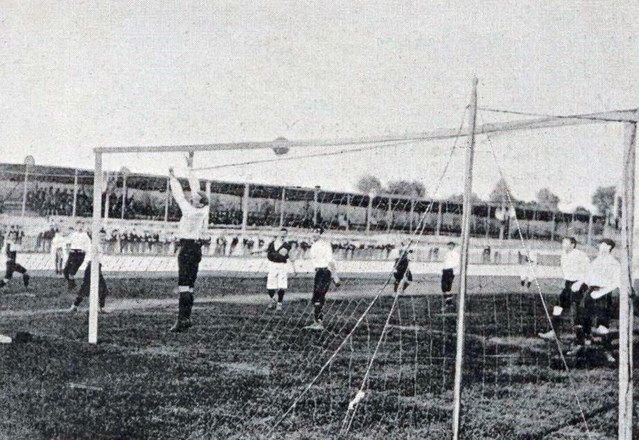 Football aux JO 1900 - USFSA contre Upton Park.